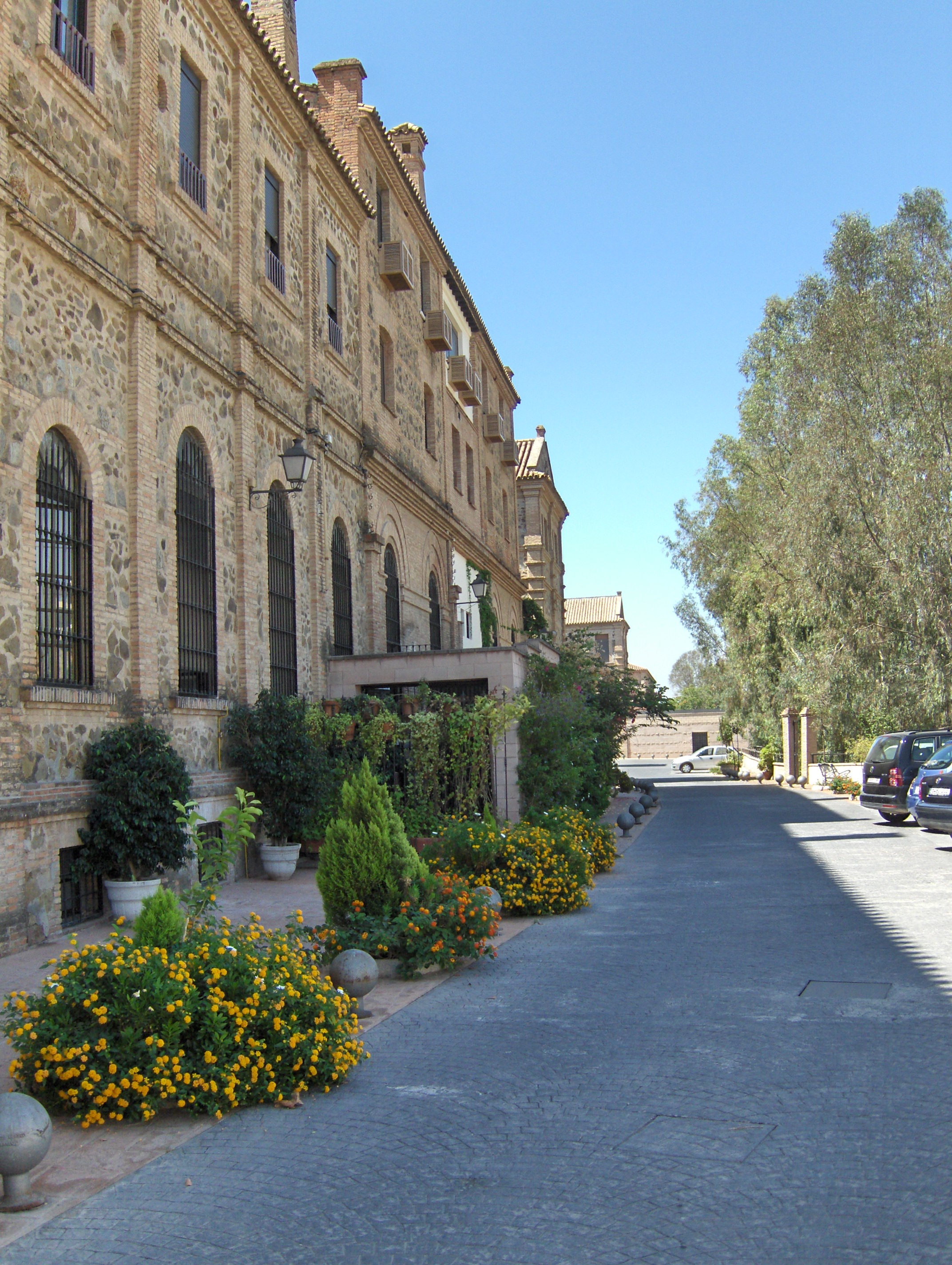 Seminario de Málaga, España.